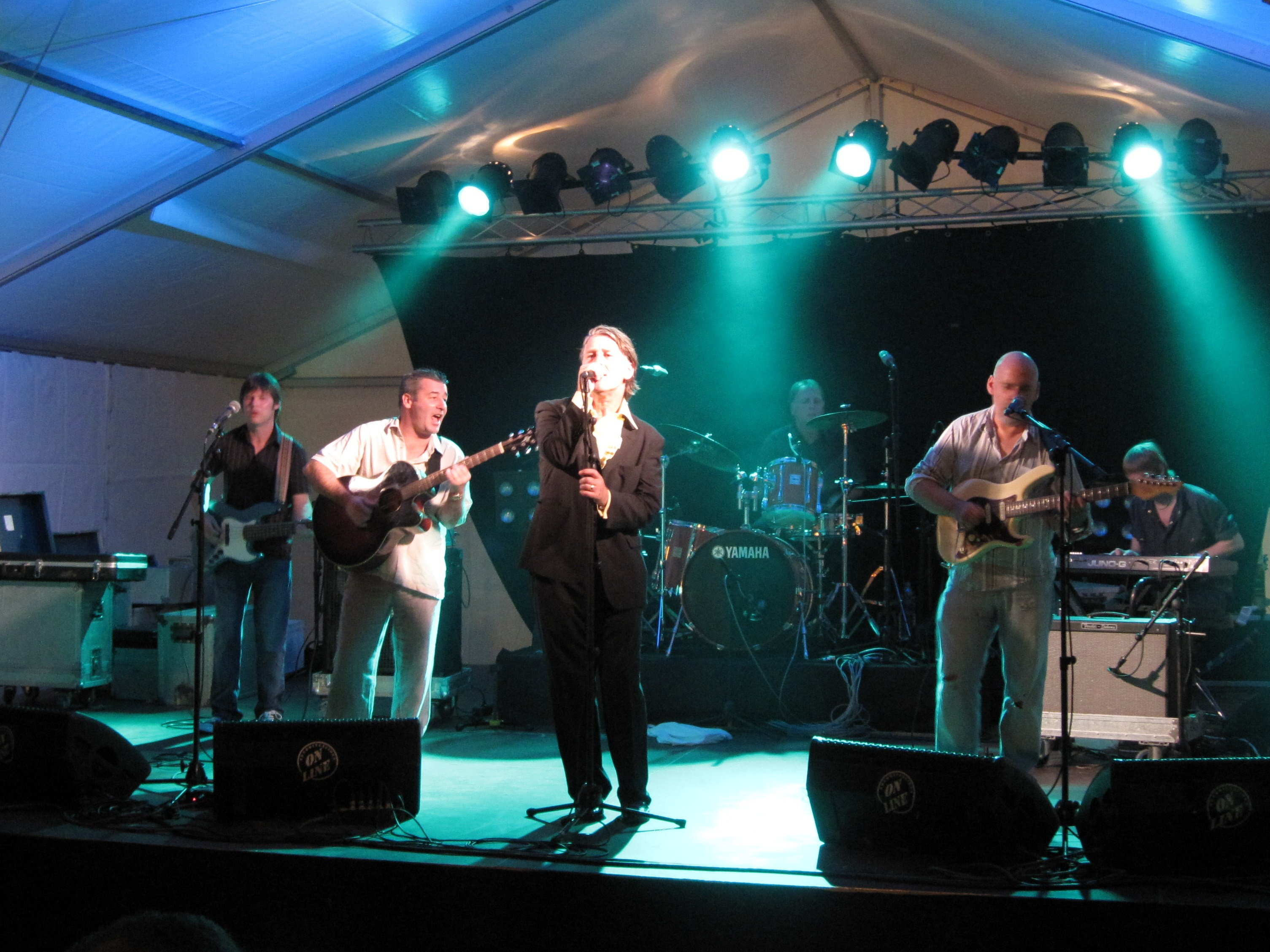 Konzert der Band China Crisis in Cala Millor, Gemeinde Son Servera, Mallorca, Spanien